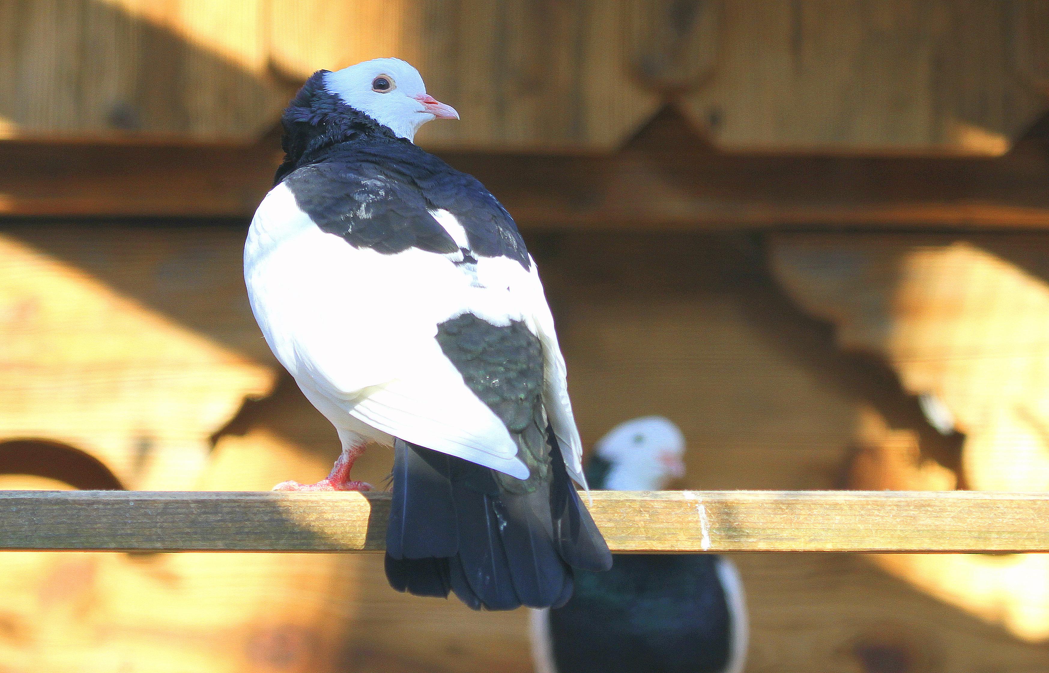 Österreichischer Ganselkröpfer,Tiergarten Schönbrunn, österreichische Zuchttaubenrasse